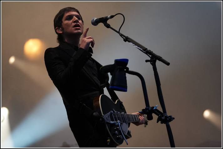 Brian Molko, à Bobital en 2007.